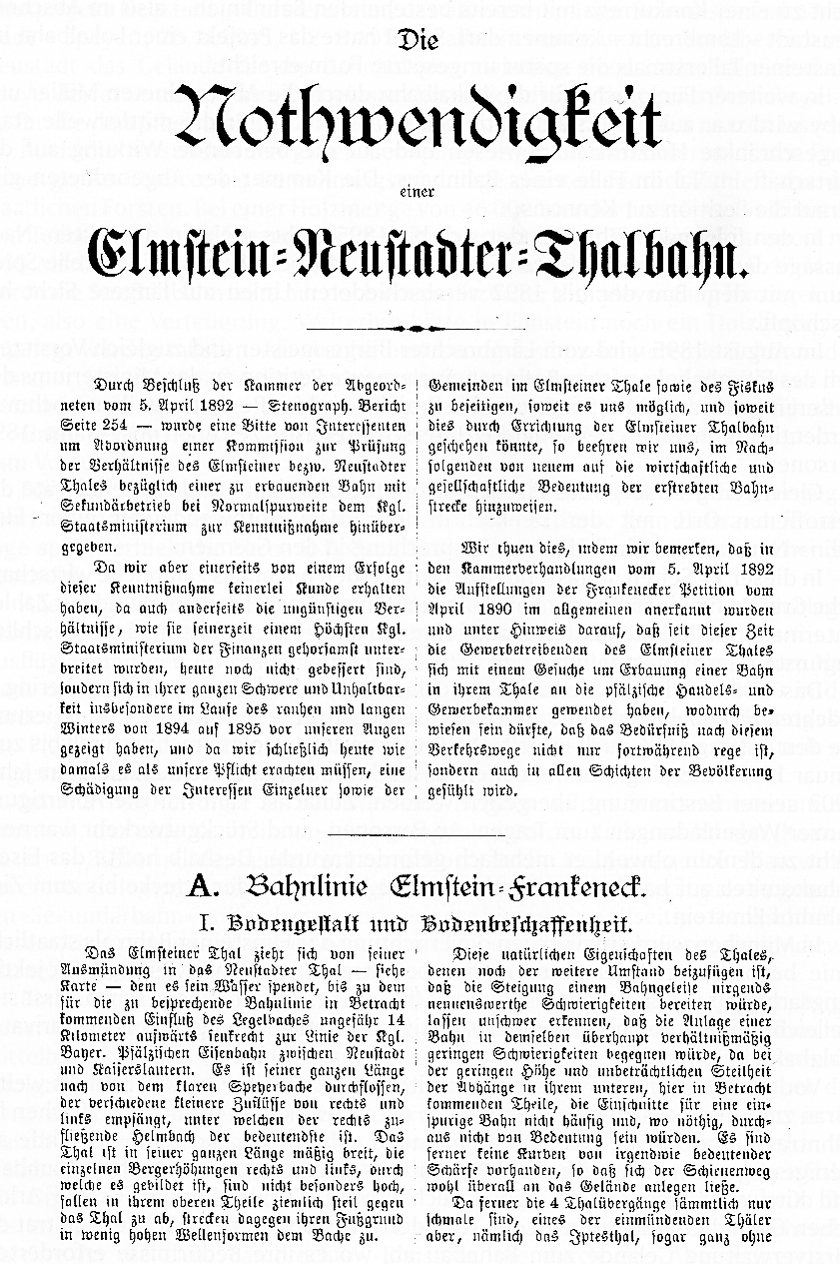 Denkschrift des Kuckucksbähnels